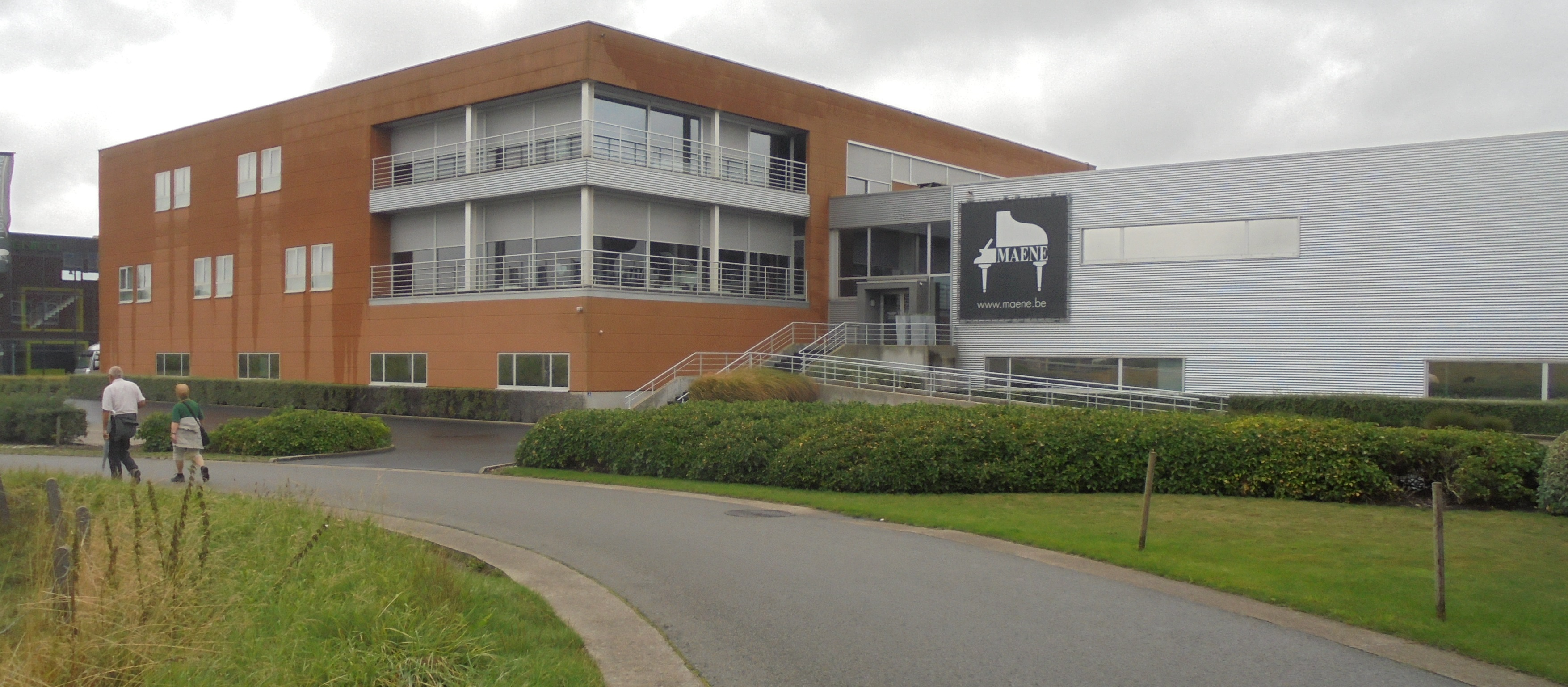 Piano's Maene - Industriestraat 42 - Ruiselede - West-Vlaanderen - België